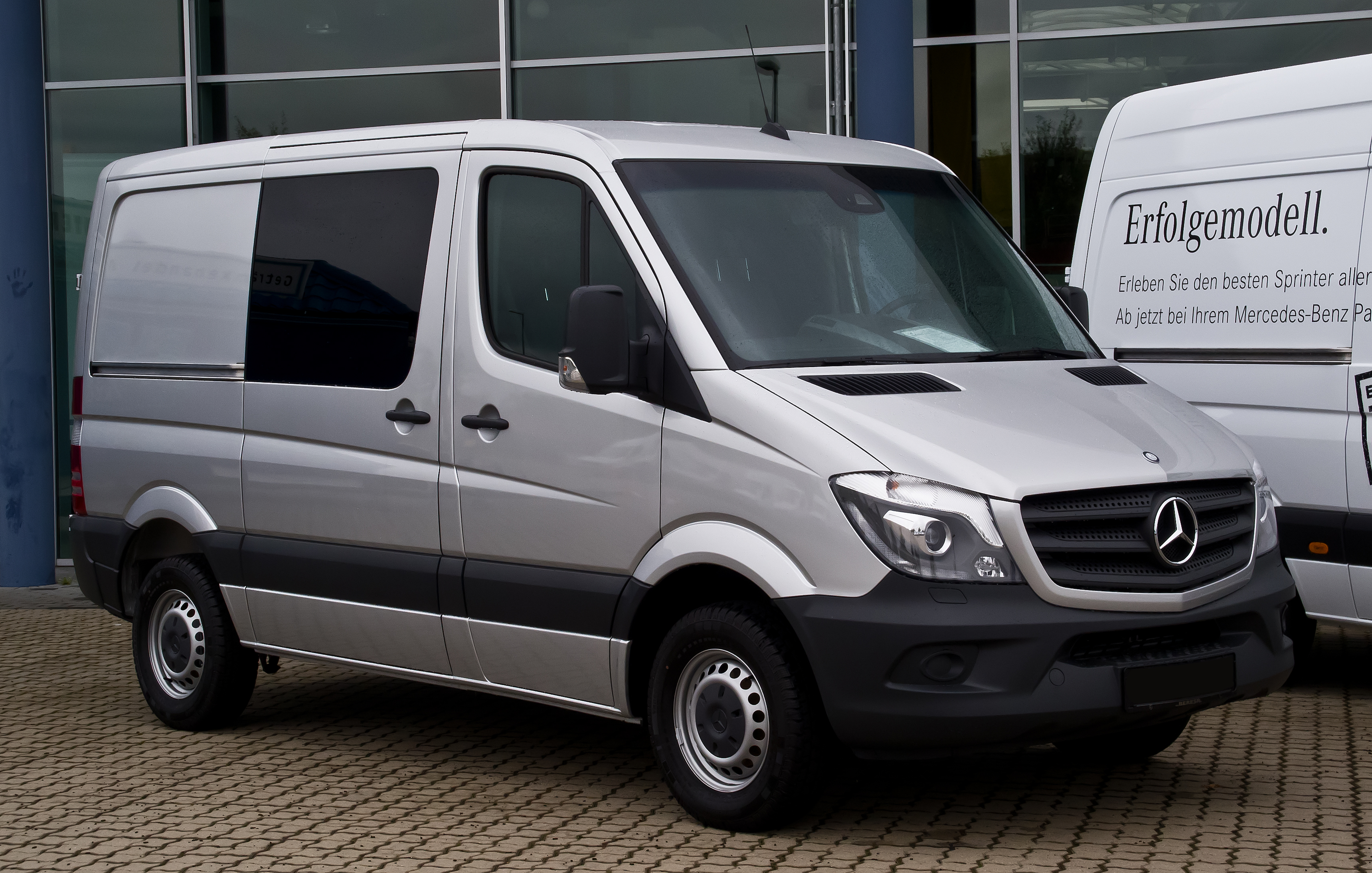 Mercedes-Benz Sprinter Mixto 216 CDI (W 906, Facelift)